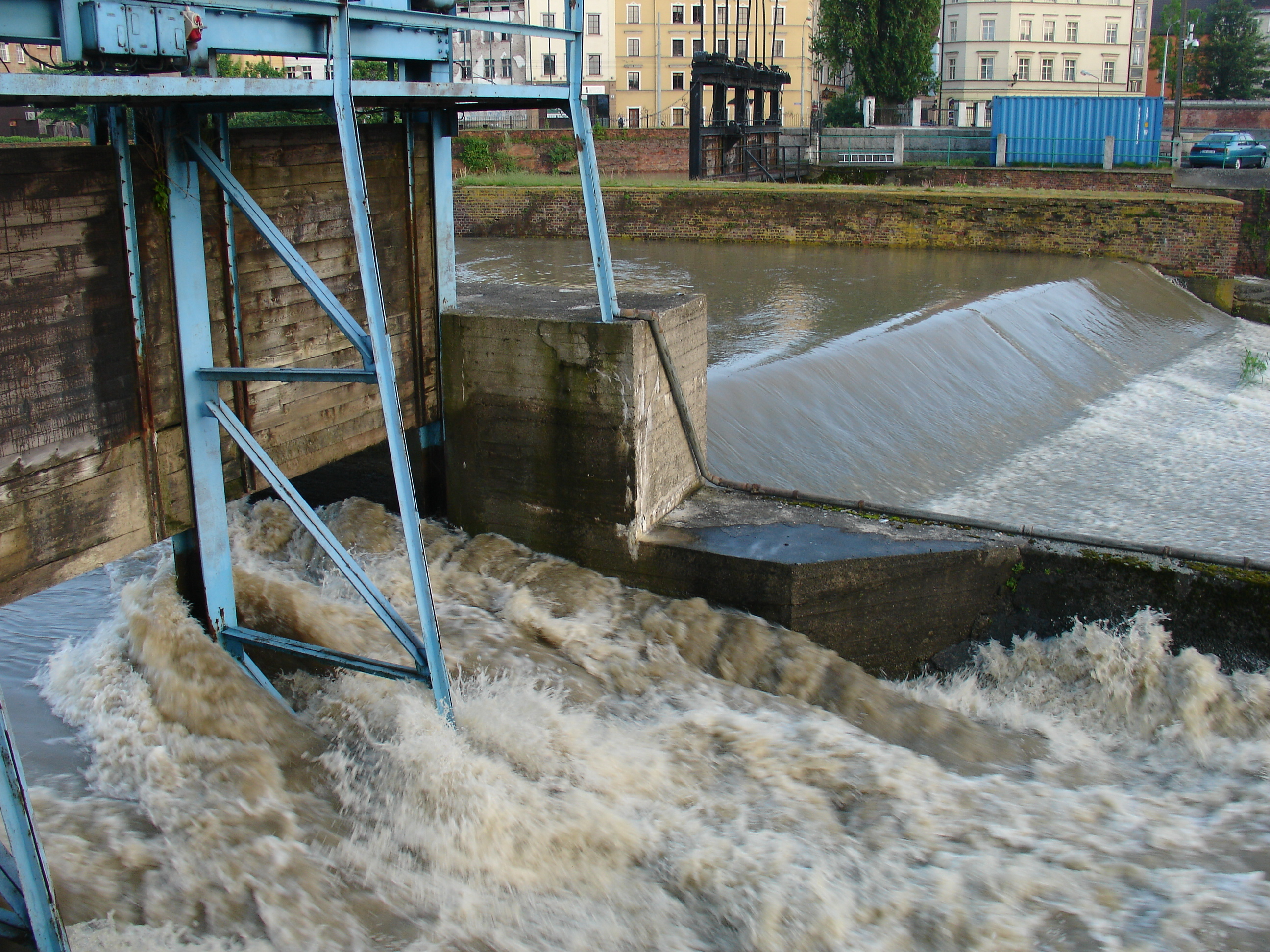 Odra na południowej elektrowni wodnej we Wrocławiu, piątek 21-05-2010, wieczór